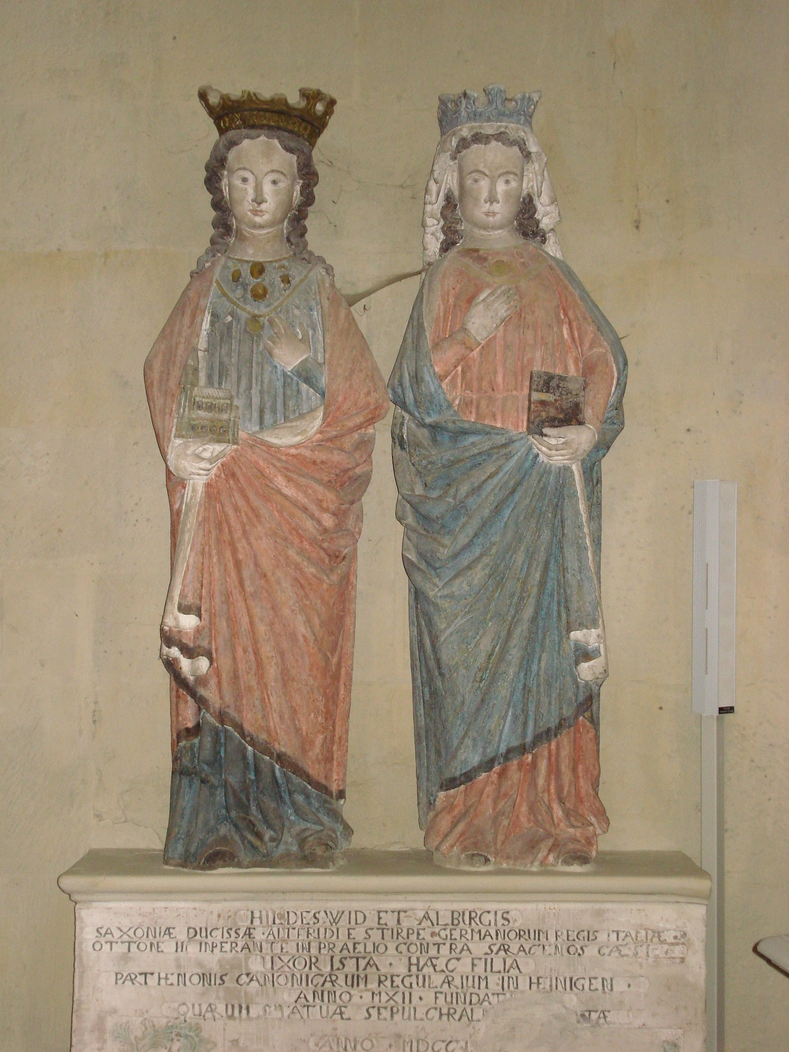 Heiningen, ehem. Klosterkirche St. Peter und Paul, Stifterinnen Hildeswid und AlburgisInschrift:HILDESWID ET ALBURGISSAXONIAE DUCISSAE ALTFRIDI E STIRPE GERMANORUM REGIS ITALIAEOTTONE III IMPERANTE IN PRAELIO CONTRA SARACENOS CAESIUXOR ISTA HAEC FILIAPARTHENONIS CANONICARUM REGULARIUM IN HEINIGENANNO MXII FUNDAT(...)QUARUM STATUAE SEPULCHRAL(...)ANNO MDCCI(...)Hildeswid und Alburgis,Herzoginnen von Sachsen, Altfrids, des Königs von Italien aus germanischem Stamm,der zur Regierungszeit Ottos III. im Kampf gegen die Sarazenen fiel,Gattin jene, diese die Tochter,Gründerinnen des Regularkanonikerinnenstifts in Heiningenim Jahr 1012,deren Grabfigurenim Jahr 17(...) restauriert